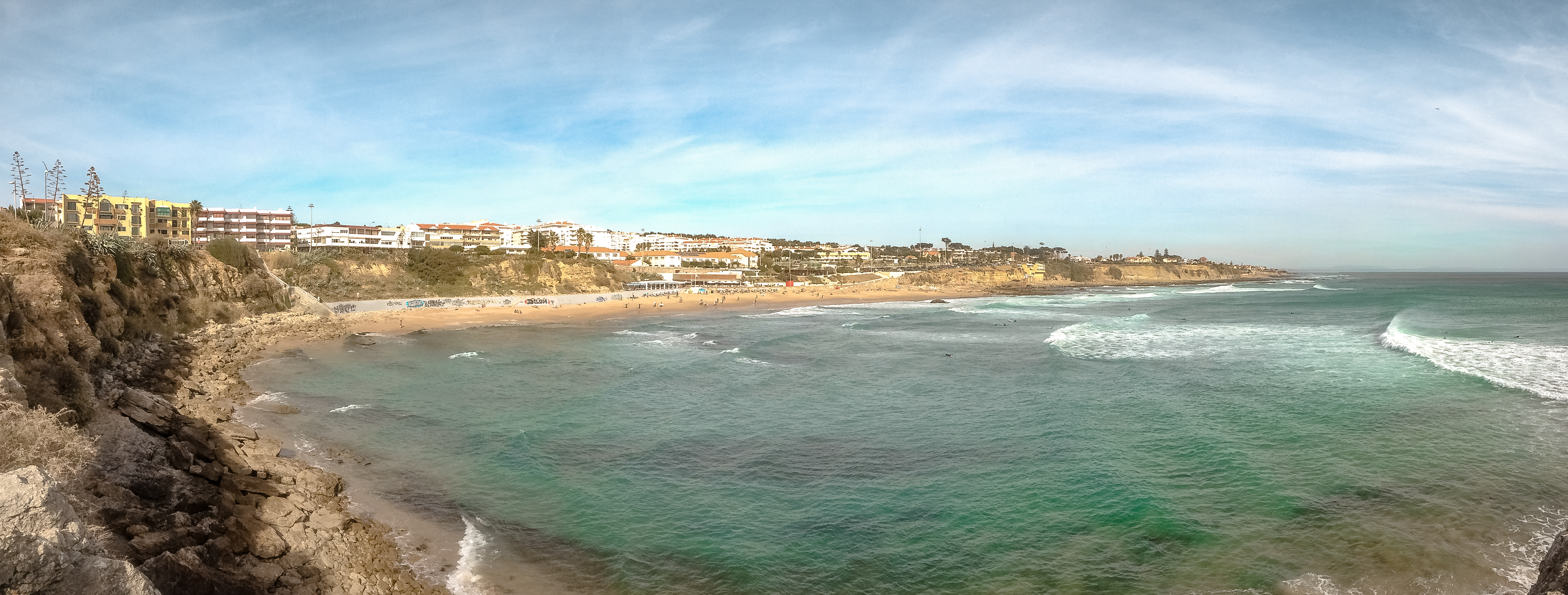 Vista panorâmica da praia de S. Pedro.